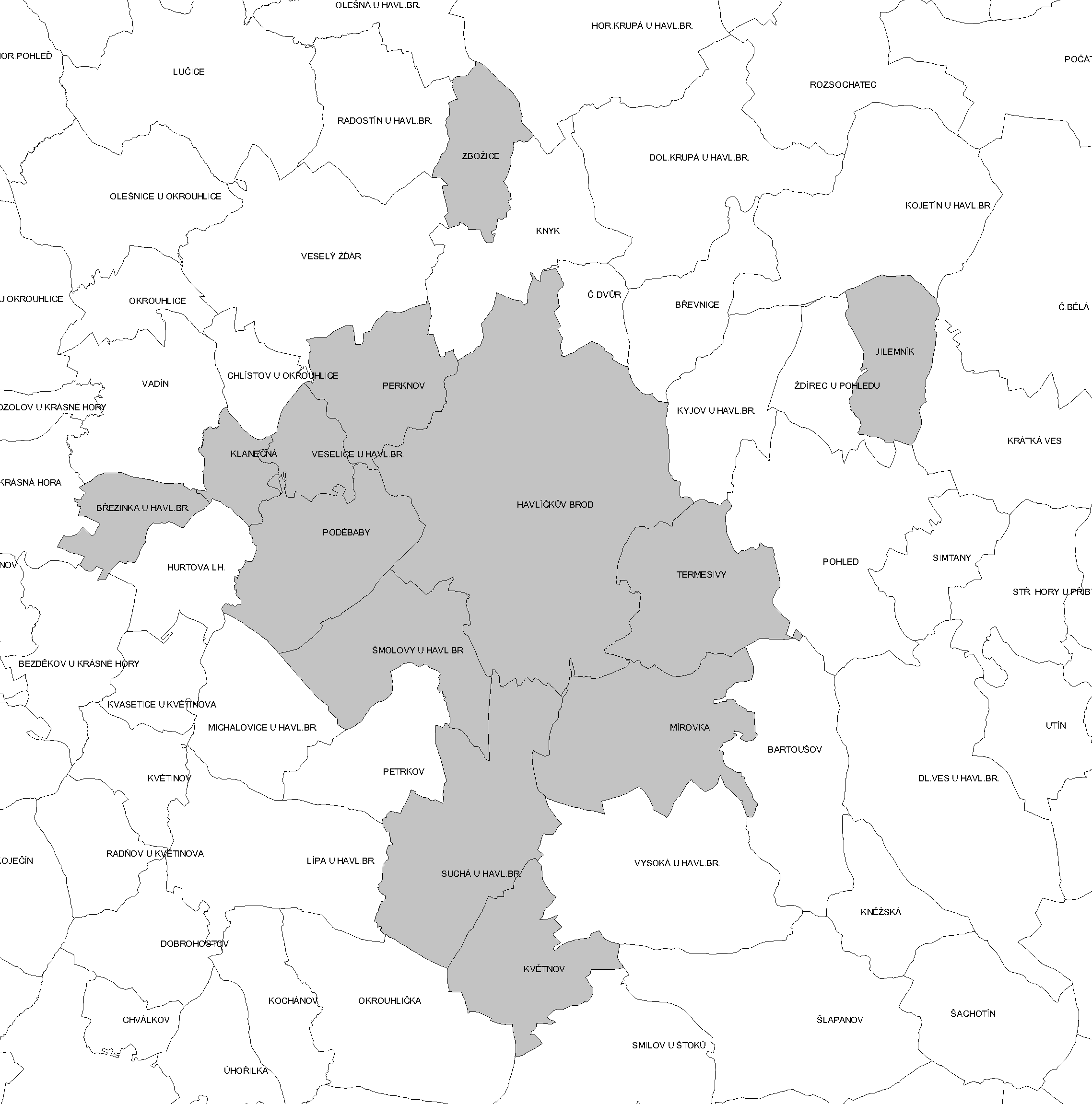 Katastrální členění Havlíčkva Brodu